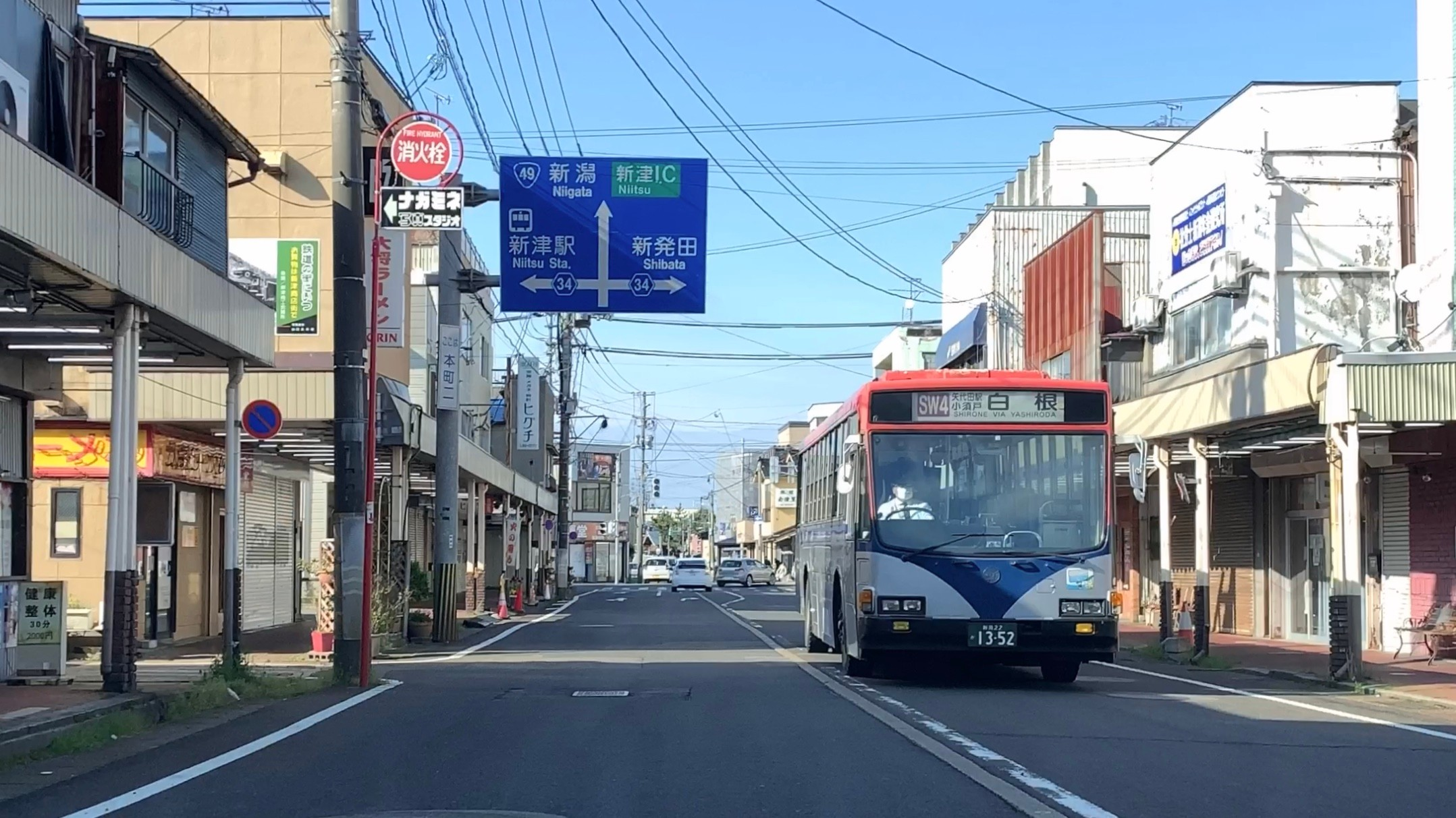 新津本町 新光商店街と新潟交通観光バス白根行（2020年4月）